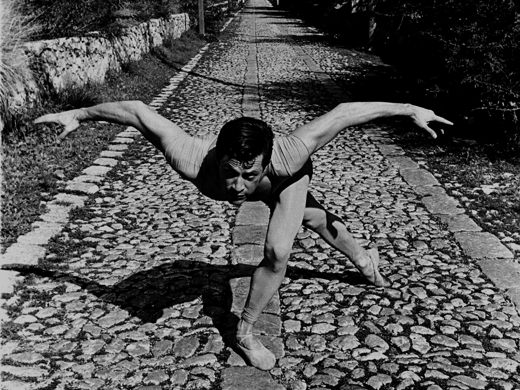 Ruben Celiberti fotografato, dal fotografo Giorgio Di Fede, nella vecchia strada di Monte Pellegrino, Palermo, Italy